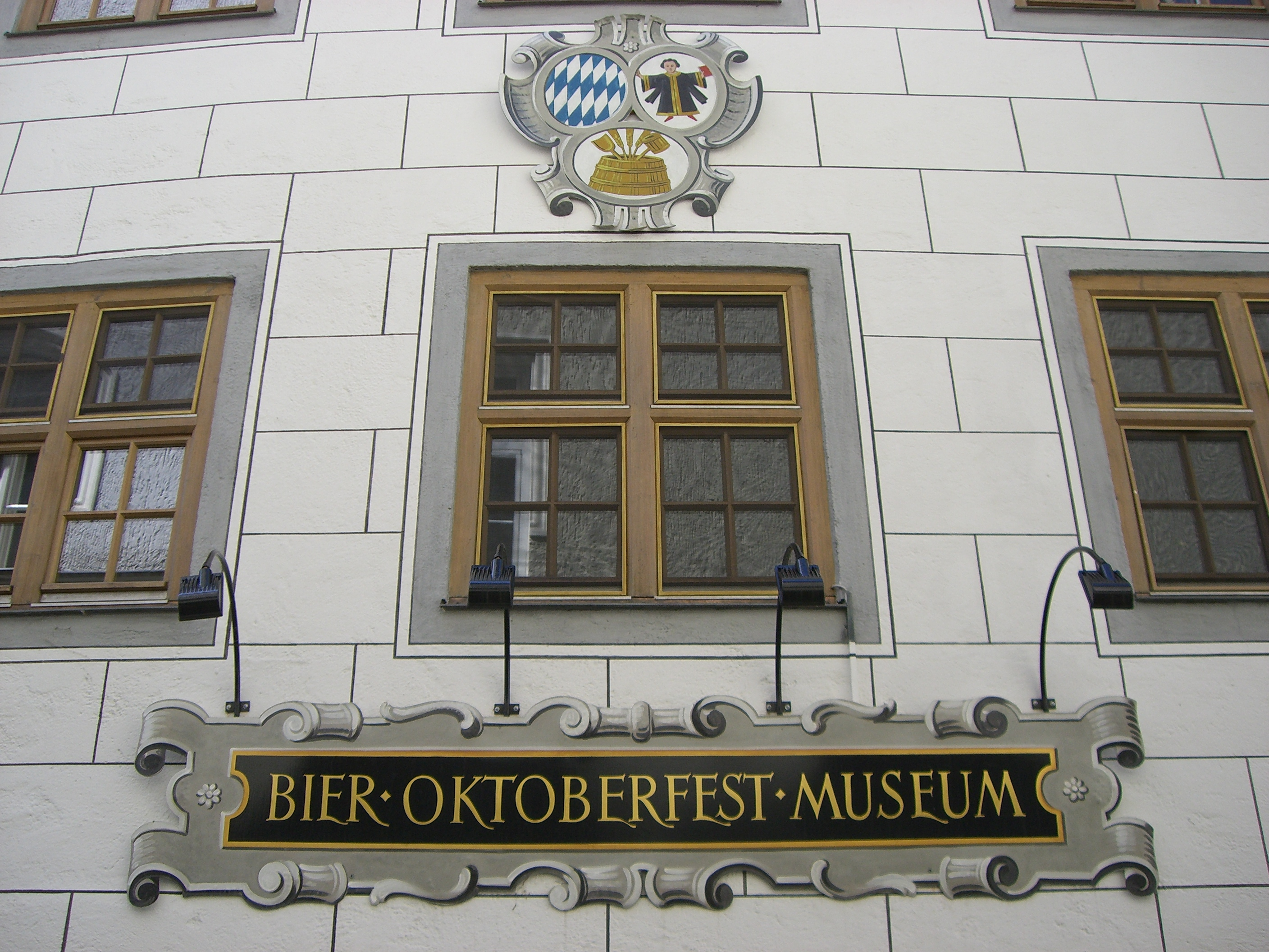 München - Bier- und Oktoberfestmuseum (Schild)